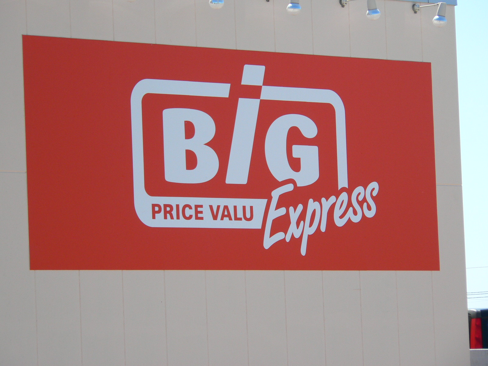 ザ・ビッグエクスプレス荒子店